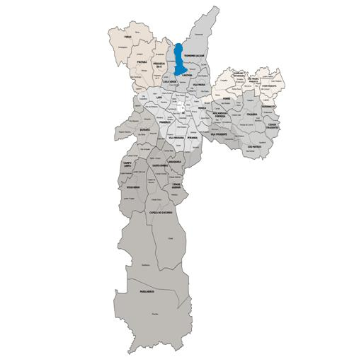 Mapa bairros da cidade são Paulo: Mandaqui